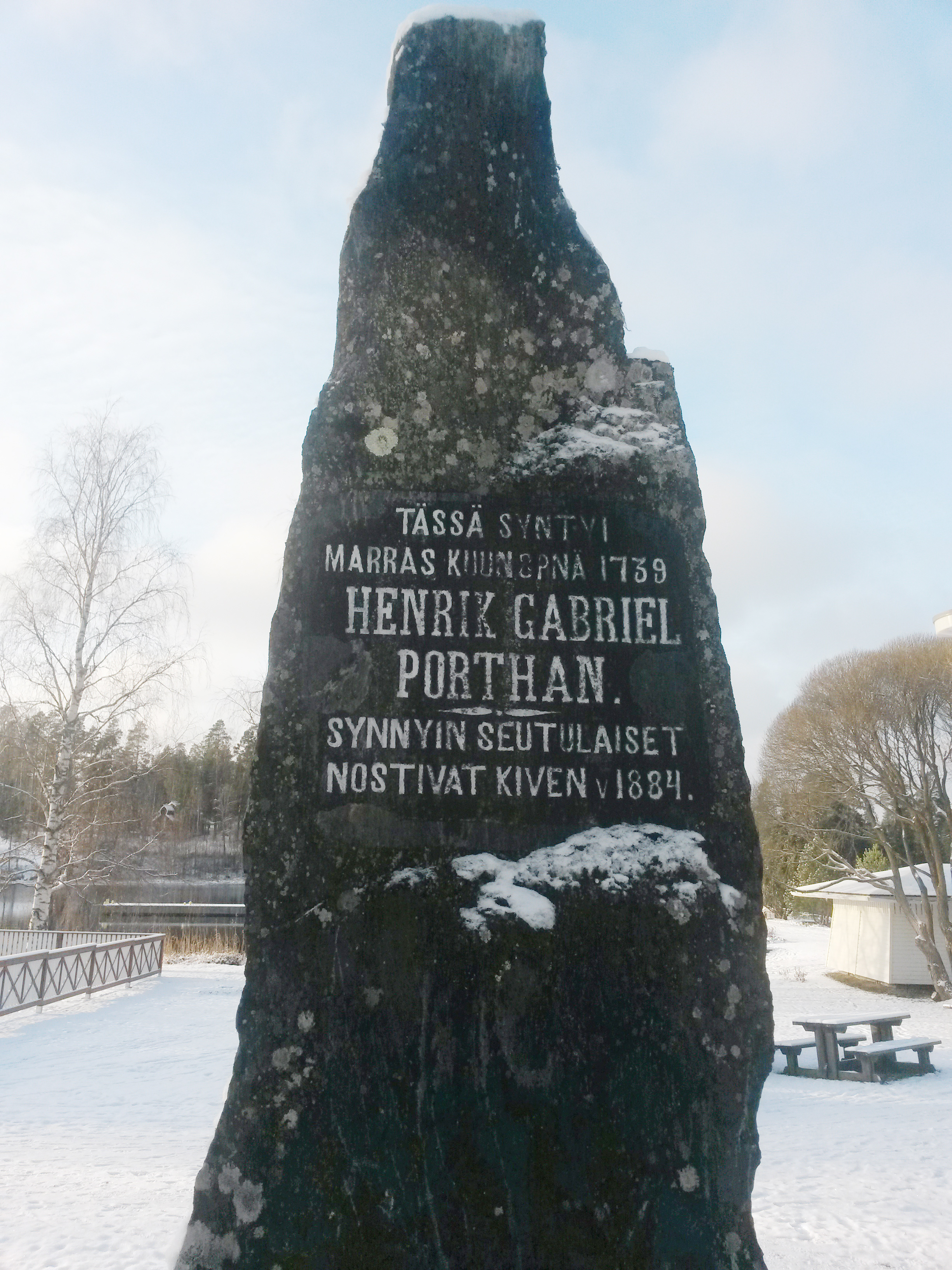 Henrik Gabriel Porthanin (1739-1804) kunniaksi vuonna 1884 pystytetty muistomerkki Porthanin puistossa Viitasaarella.